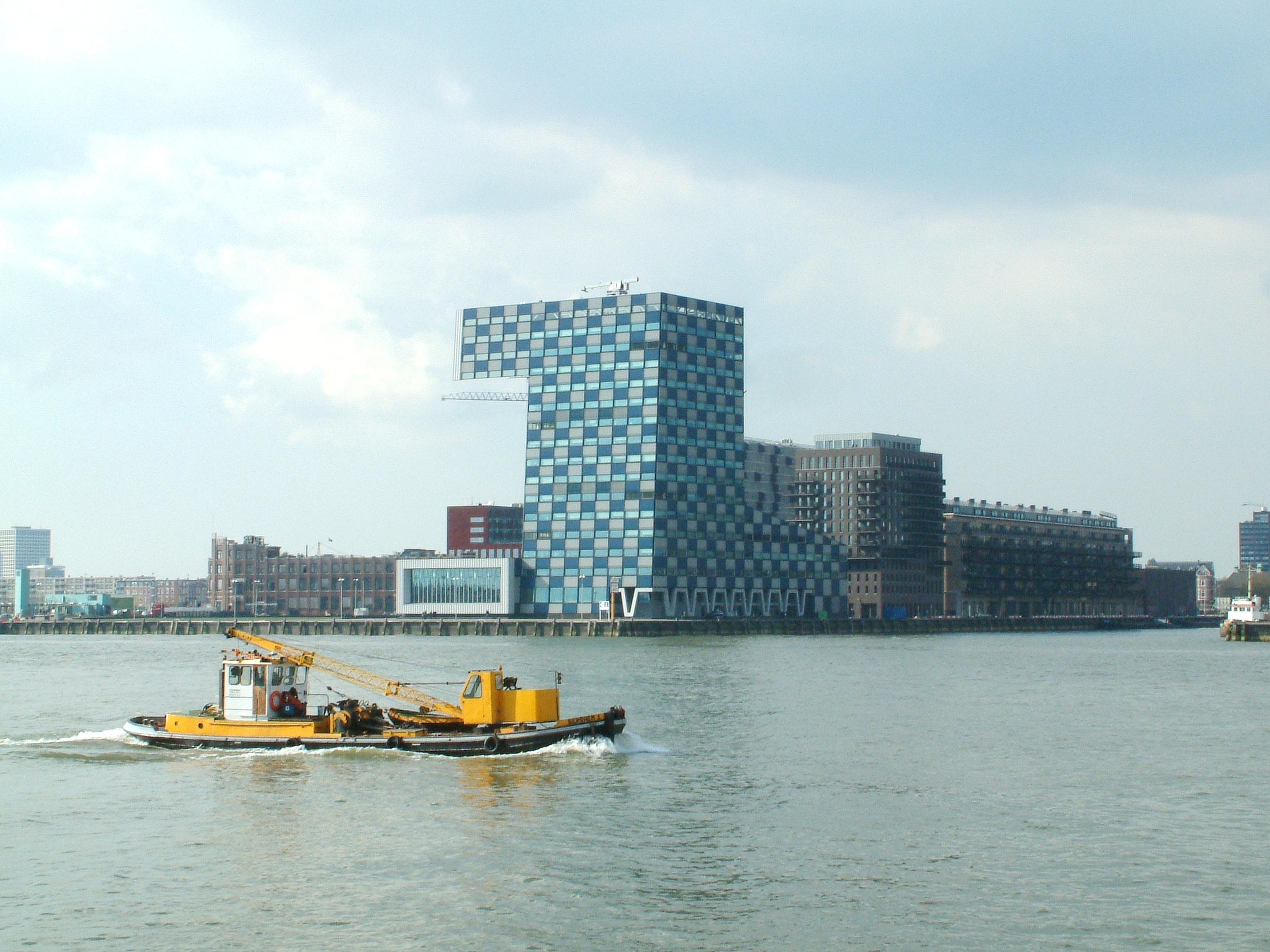 Rotterdam Scheepvaart en Transport College